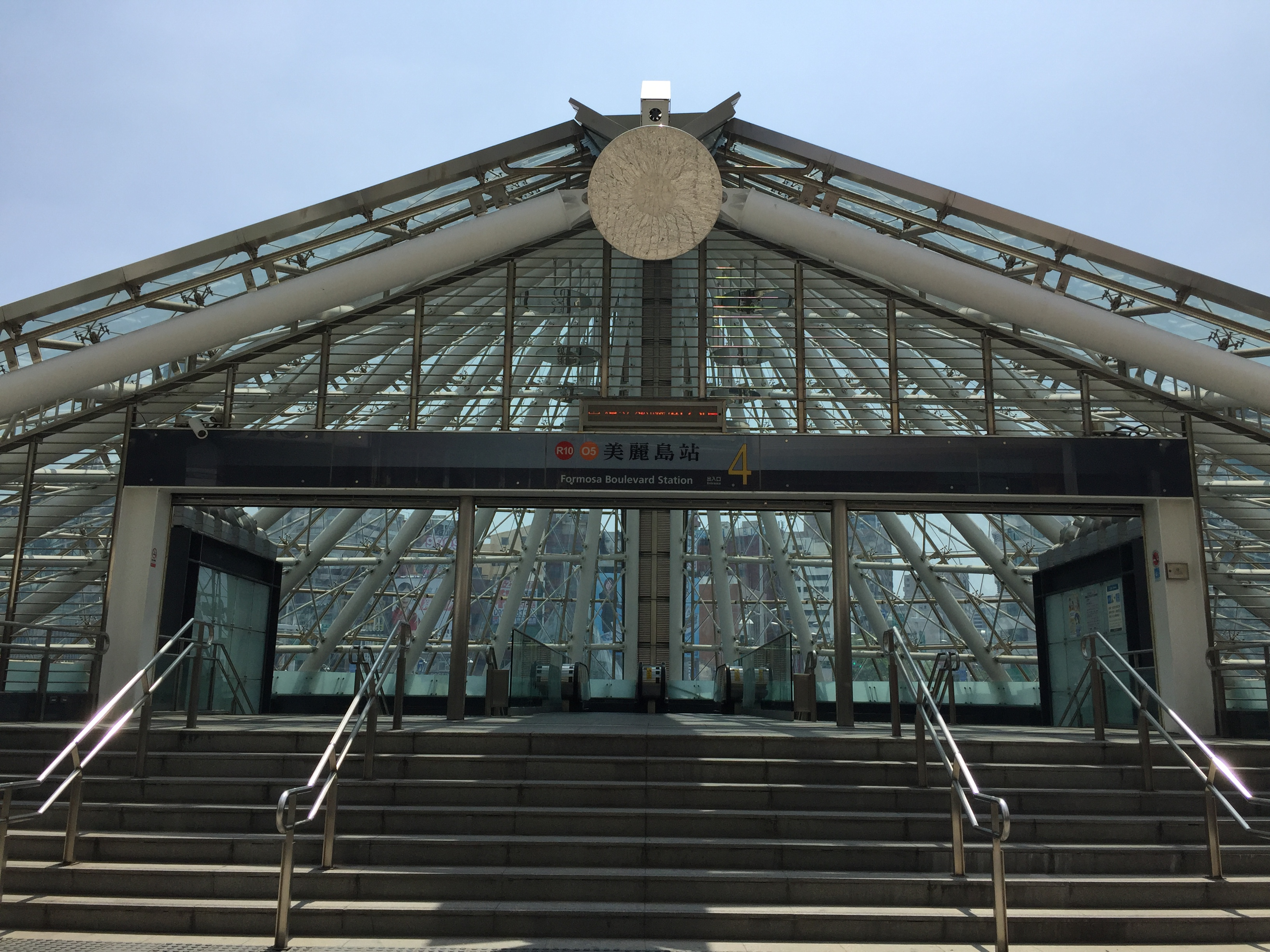 Formosa Boulevard Station Foto